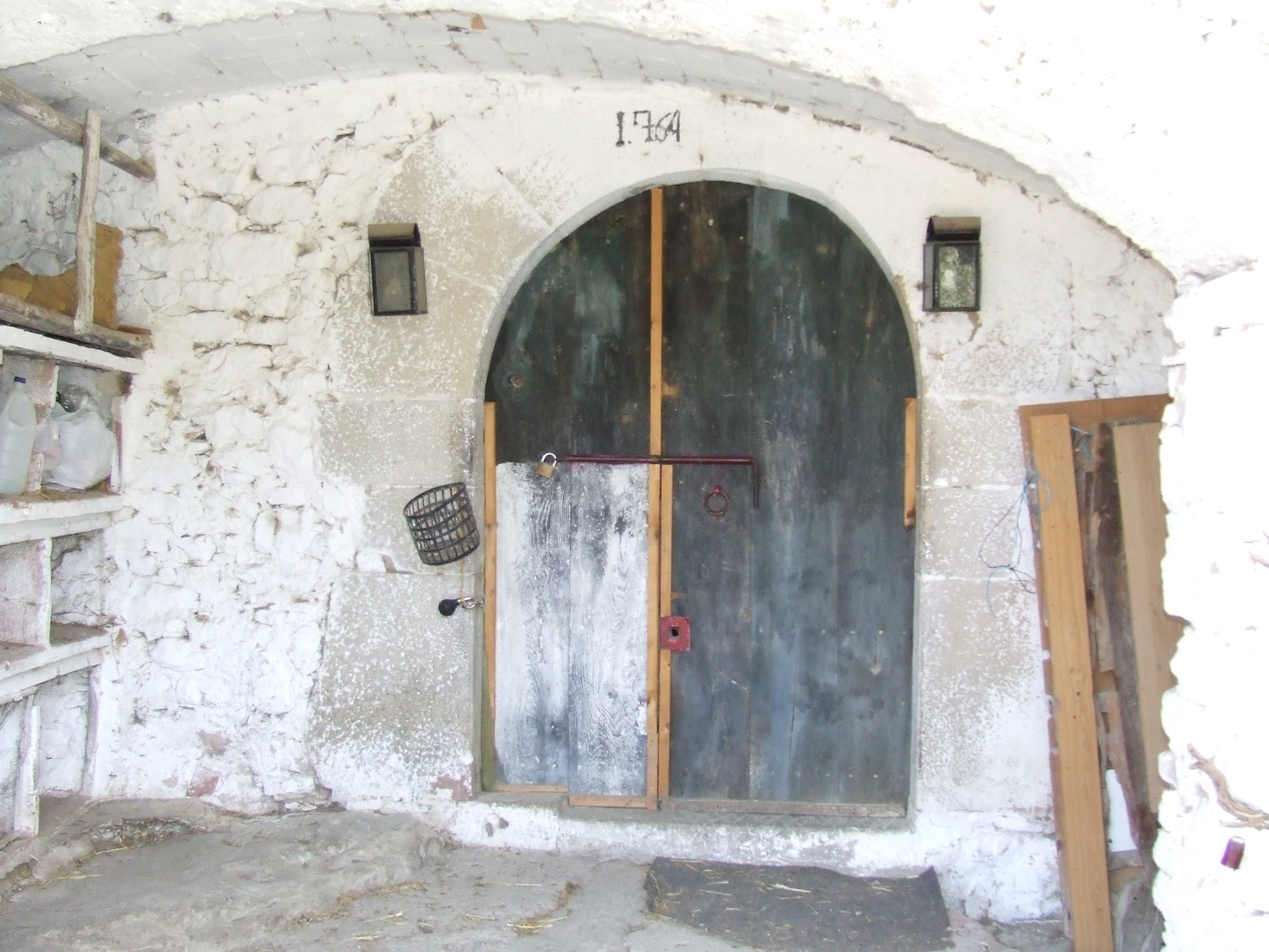 Portal de la masia del Xei (Marfà, Castellcir, Moianès)